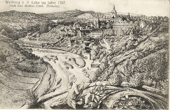 Weilburg, Zeichnung von Karl Matthias Ernst (1758-1830)